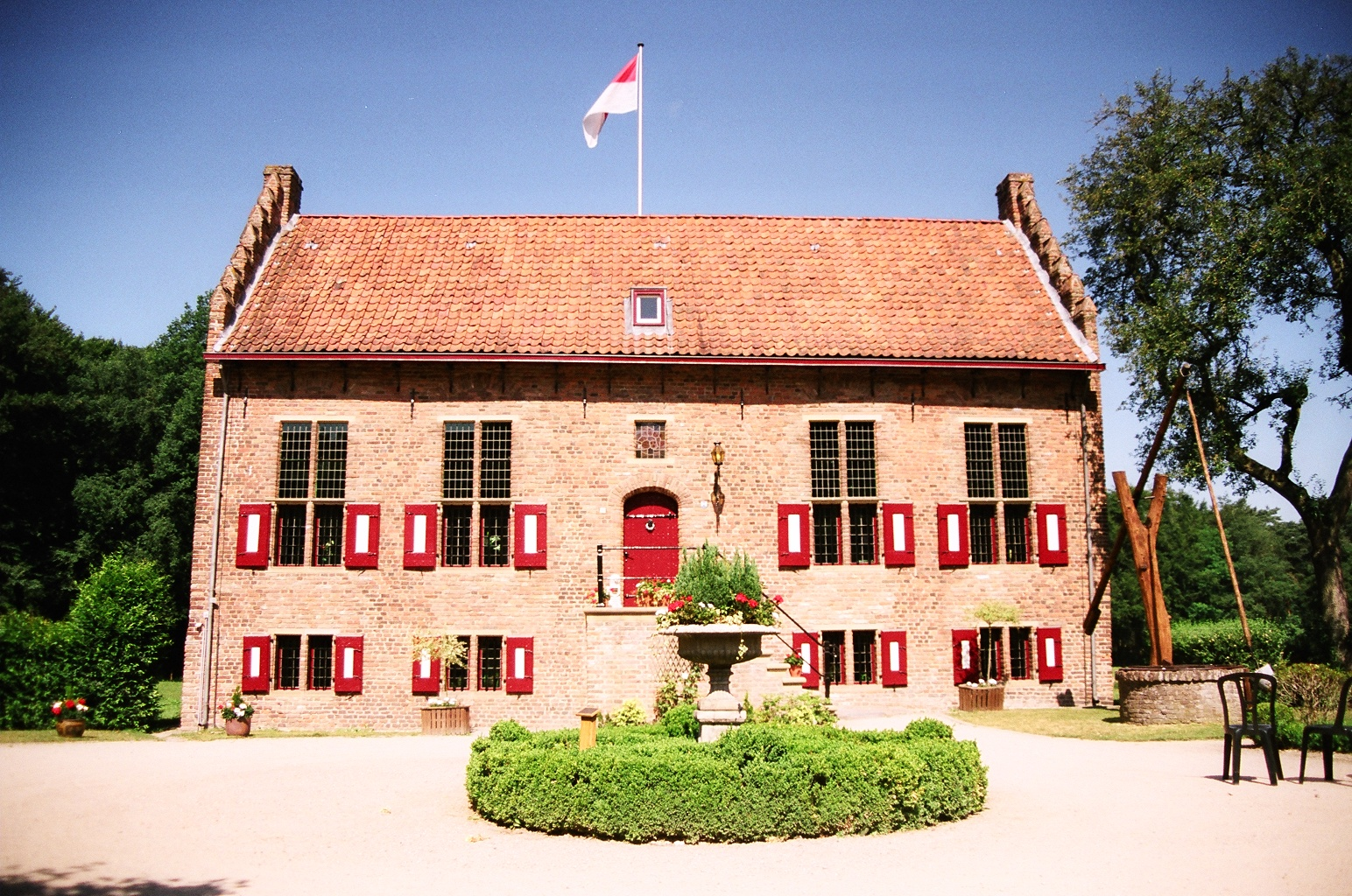 Havezate Hagen